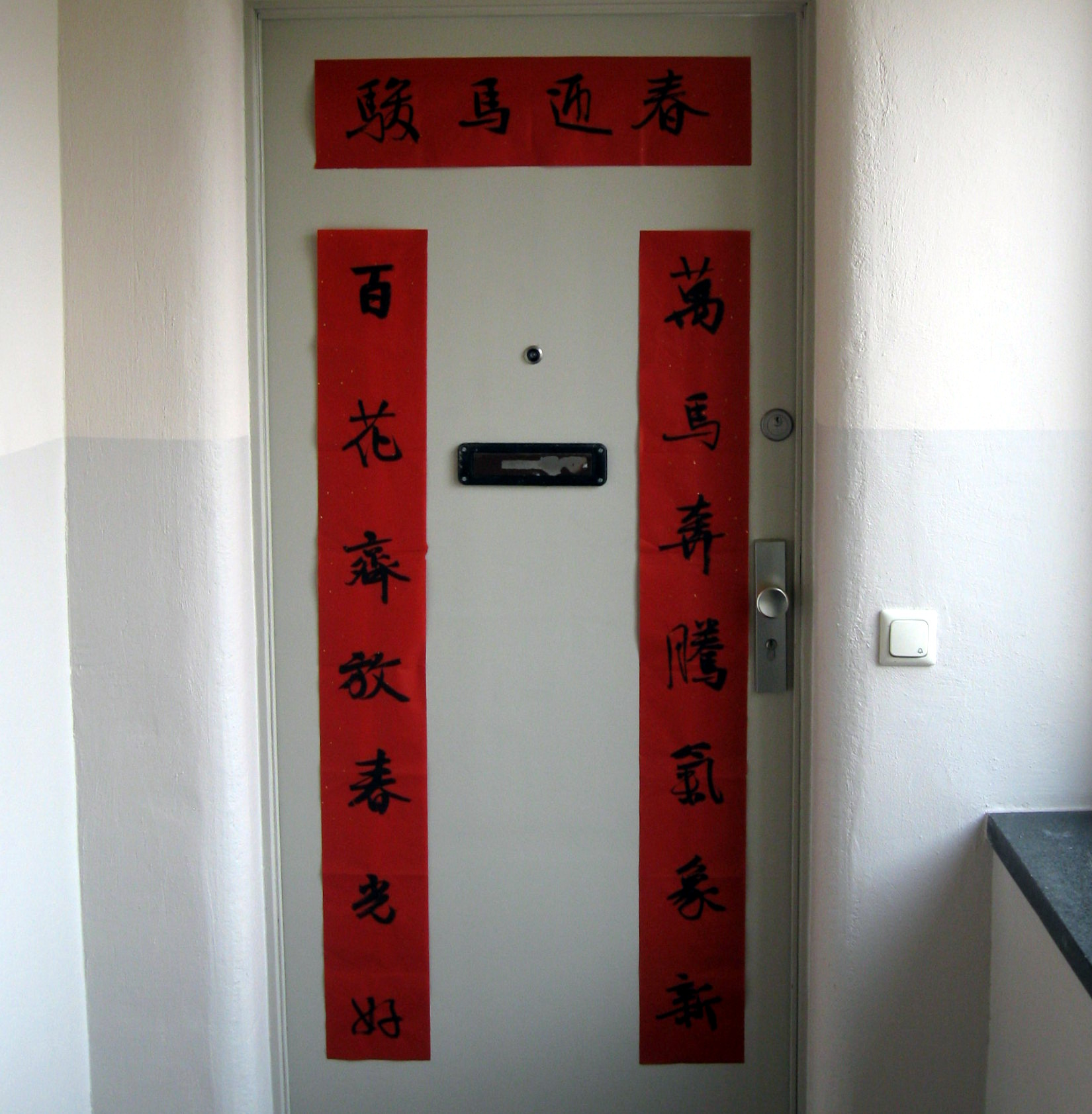 Chinese Marks Door